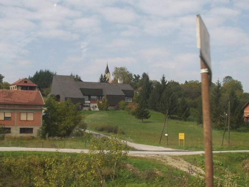 Gradec - Dom Zdravlja i Crkva